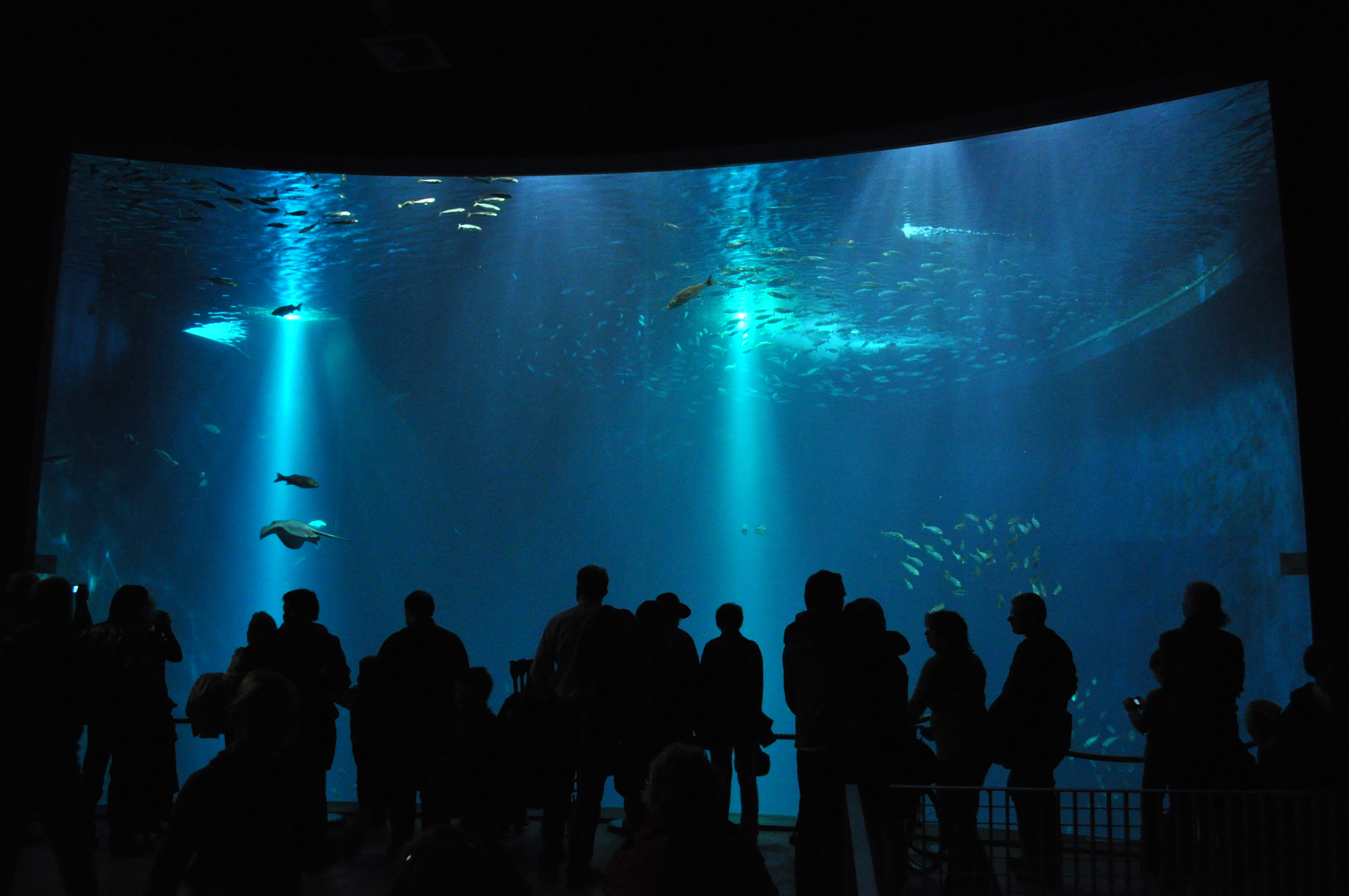 Ein Aquarium im Ozeaneum Stralsund: Offener Atlantik.